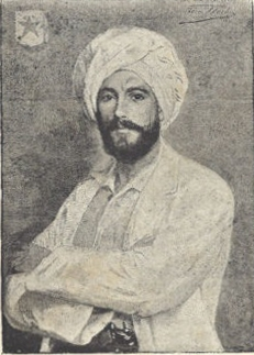 Jerôme Becker né a Kalmthout en 1850 mort à Anvers en 1912. Lieutenant d'artillerie, explorateur au Congo. Auteur de "la Vie en Afrique" (1887) 2vol. et "La 3ème expédition belge au Pays Noir" (1883). Becker paraît ici en "costume de station (coloniale)" comme le dit la légende dans l'ouvrage original.